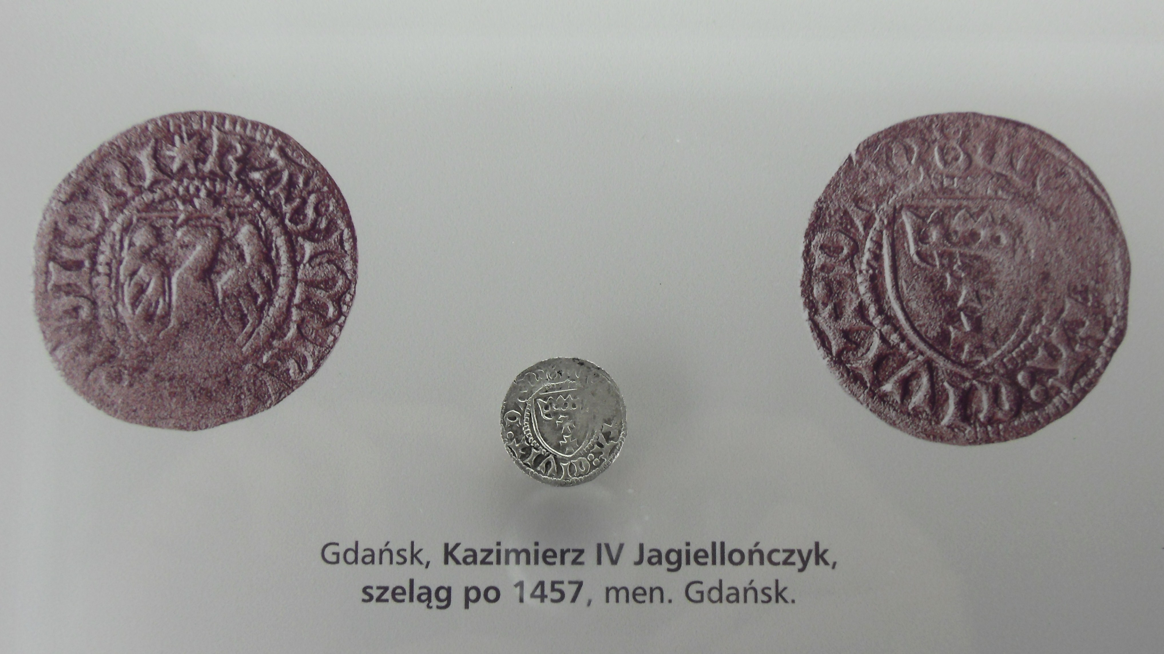 Gdańsk, Wyspa Spichrzów. Ul. Chmielna, spichlerz Błękitny Baranek, zbiory - Gdańsk, Kazimierz IV Jagiellończyk, szeląg po 1457 r.